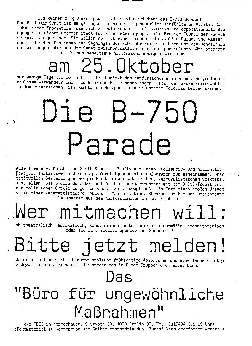 Handzettel zur B-750 Parade / Büro für ungewöhnliche Maßnahmen, Berlin